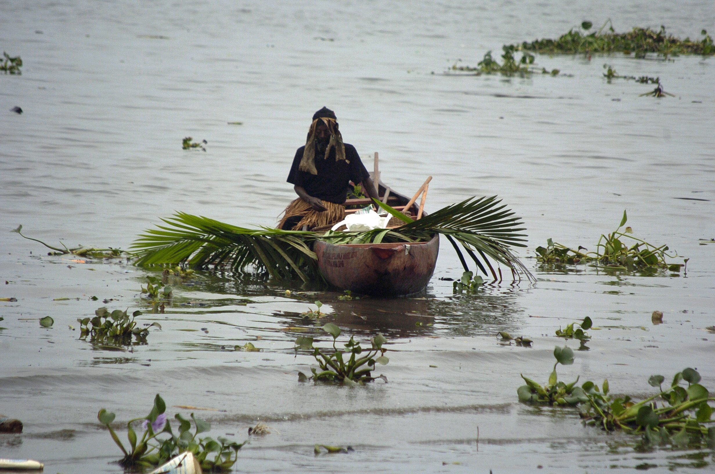 Messager du Ngondo This is an image of Cultural Fashion or Adornment from Cameroon